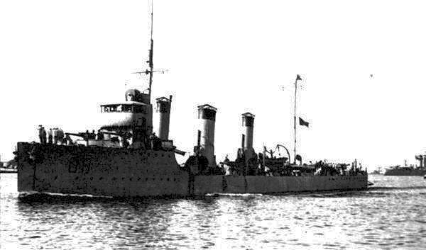 Il cacciatorpediniere Vincenzo Giordano Orsini a Brindisi.